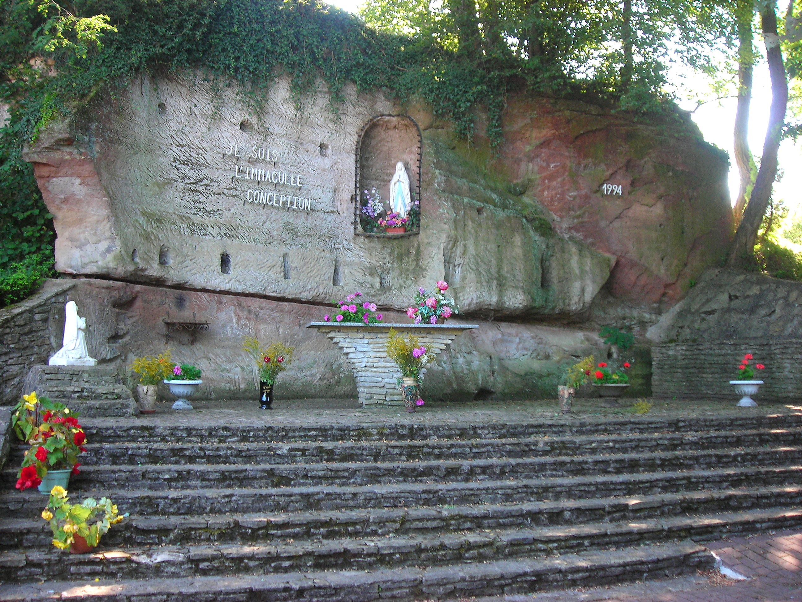 Grotte de Lourdes à Bisten-en-Lorraine (Moselle, France).